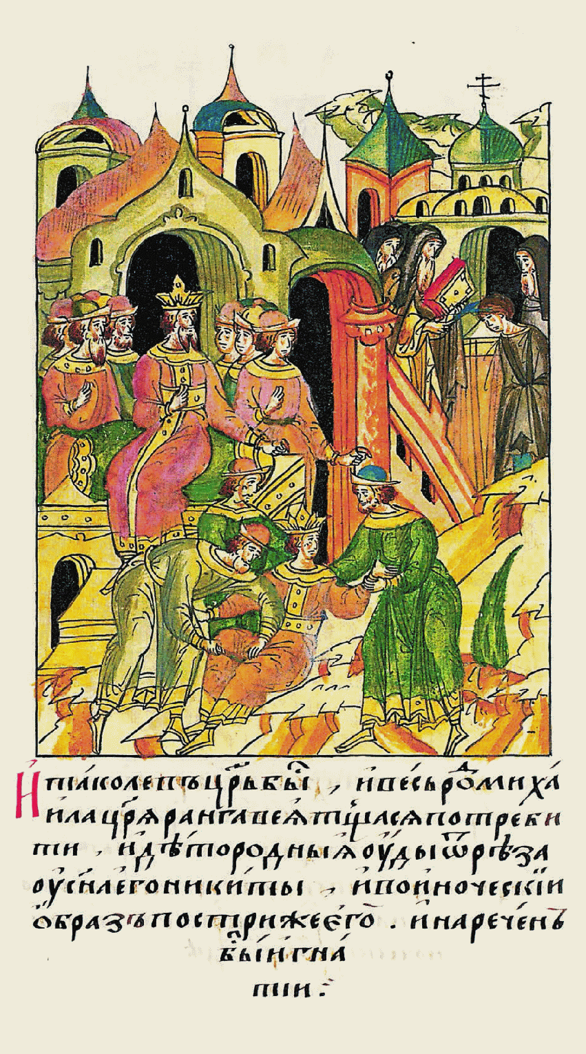 И так стал царем Лев, он хотел уничтожить весь род царя Михаи- ла Рангавея и отрезал у его сына Никиты детородные уды, по- стриг его в иноческий образ и нарек Игна- тием